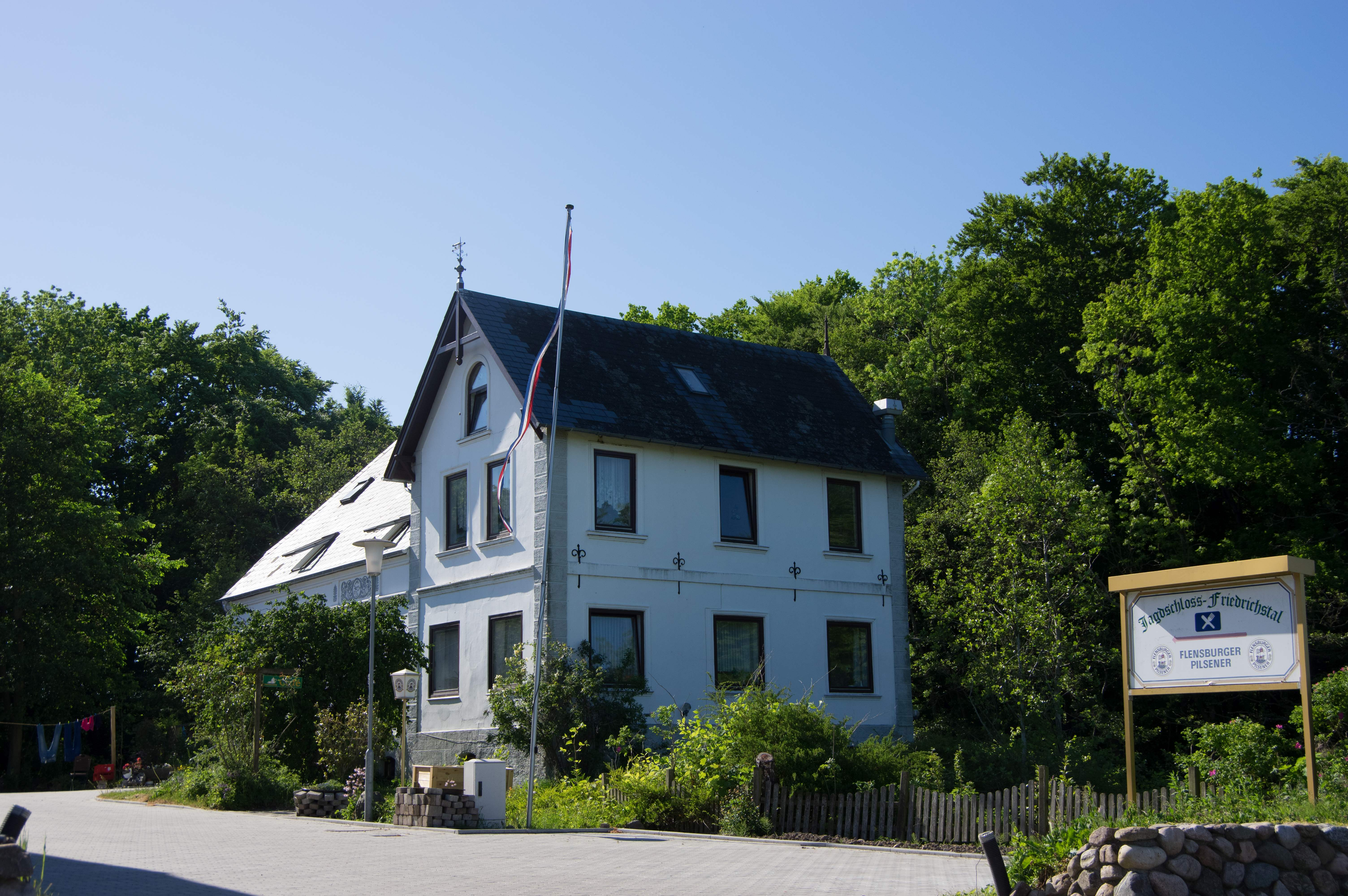 Das ehemalige Jagdschloss in Friedrichstal in der Gemeinde Steinbergkirche ist heute ein Restaurant.